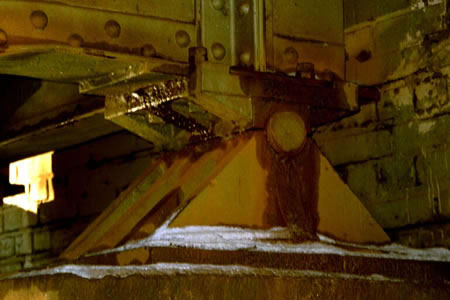 Einrollen-Kipplager an Eisenbahnbrücke in Cottbus nahe Ortsteil Branitz